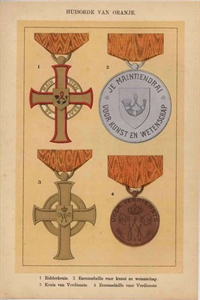 Huisorde van Oranje op een litho uit 1890